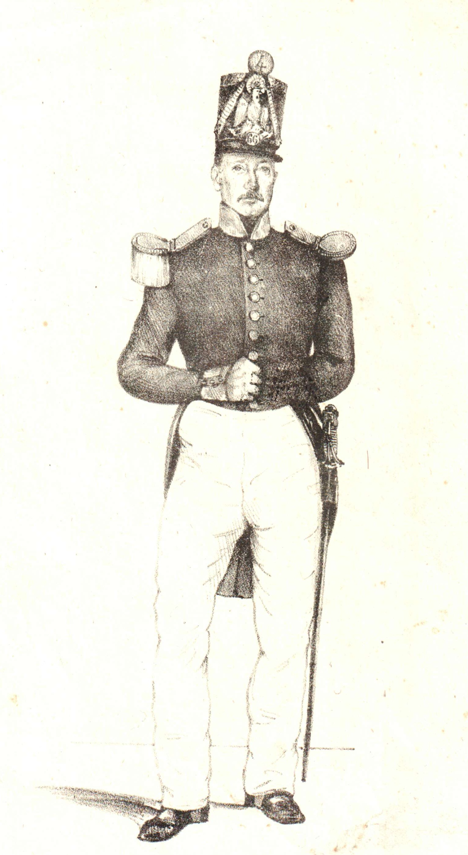 Croquis anonyme d'un lieutenant du 66e de ligne sous le IInd empire